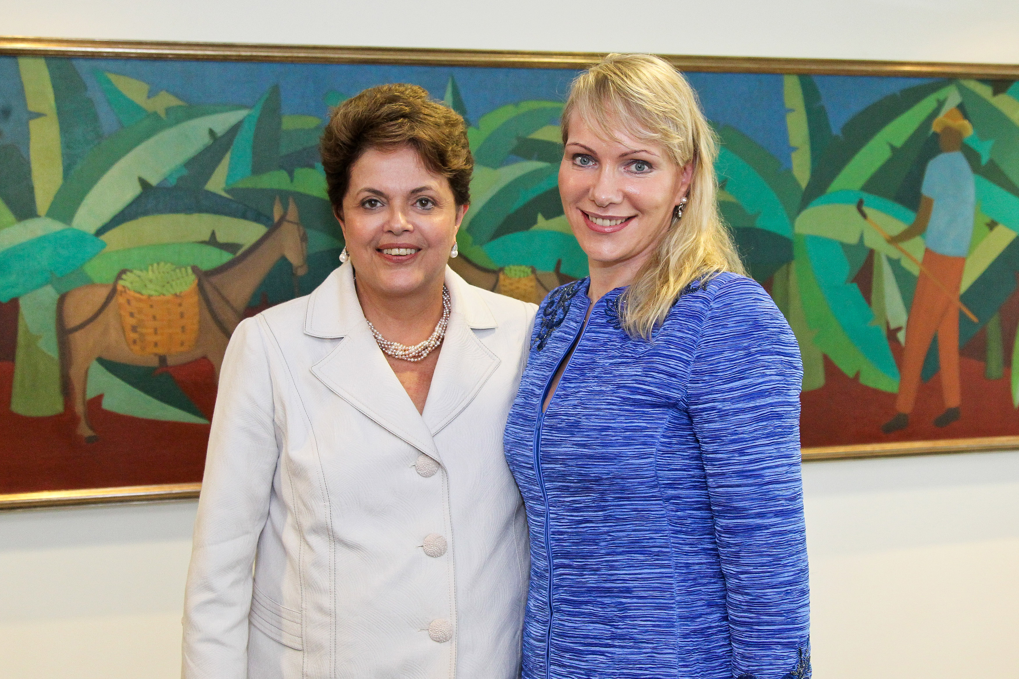 Presidenta Dilma Rousseff durante encontro com Margarita Louis Dreyfus, Presidente do Grupo Dreyfus, no Palácio do Planalto. (Brasília - DF, 22/11/2011)